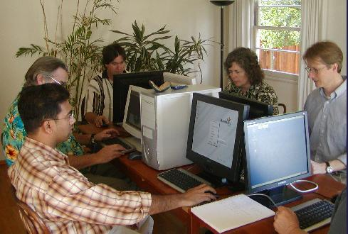 Personas utilizando multiterminal